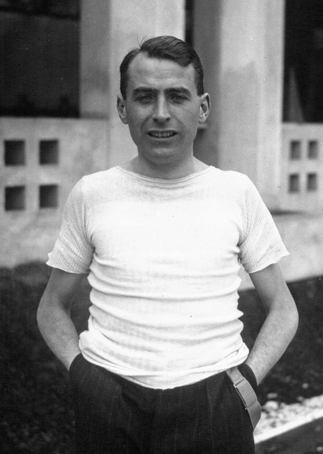 Cross Country : coureurs à pied du Racing (portrait à 2 m) : Marchal : [photographie de presse] / Agence Meurisse